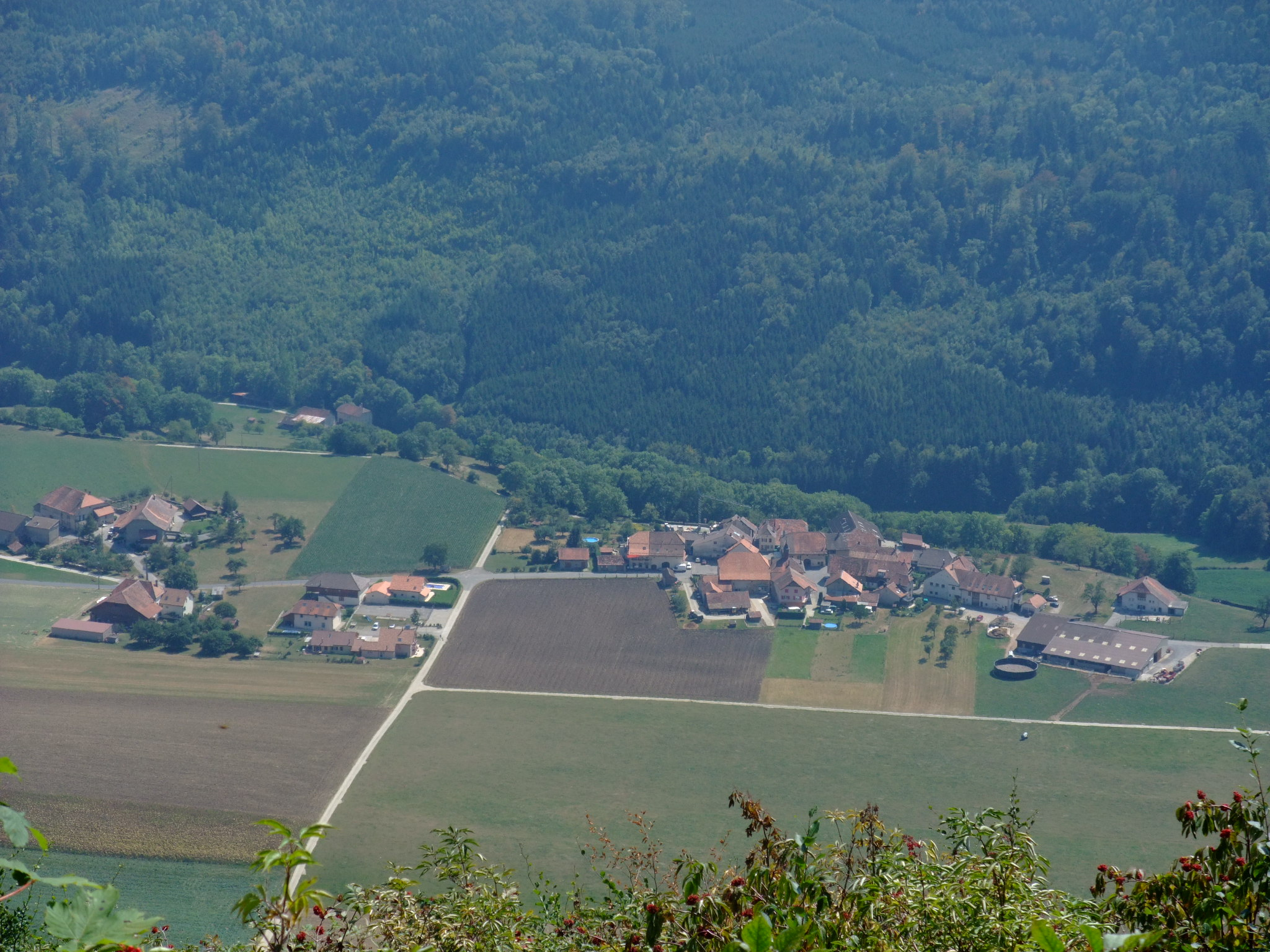 Novalles vu depuis la côte au nord du village